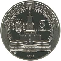 Монета 350 років м.Івано-Франківську аверс